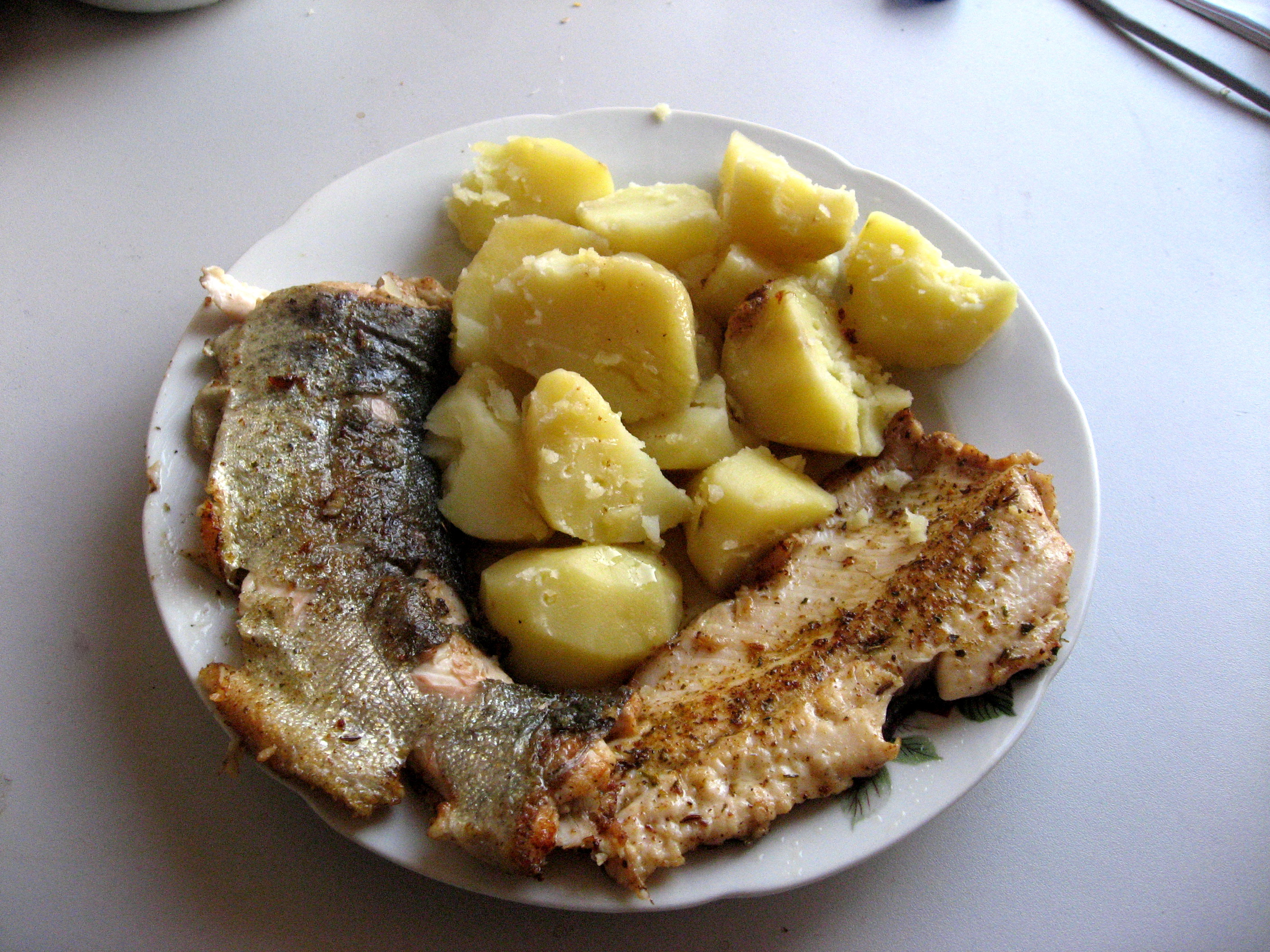 Pstruh duhový a vařené brambory